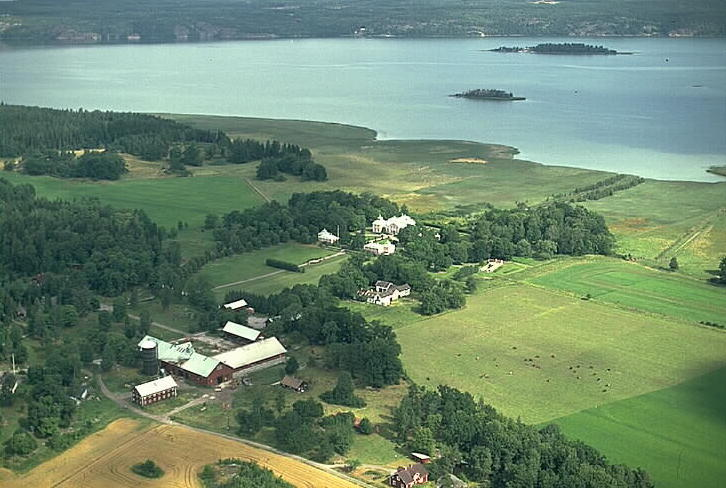 Motiv: Ållonö slott Nyckelord: Flygbilder, Riksintressen Kategori: Herrgårds-/slottslandskap Ållonö slott